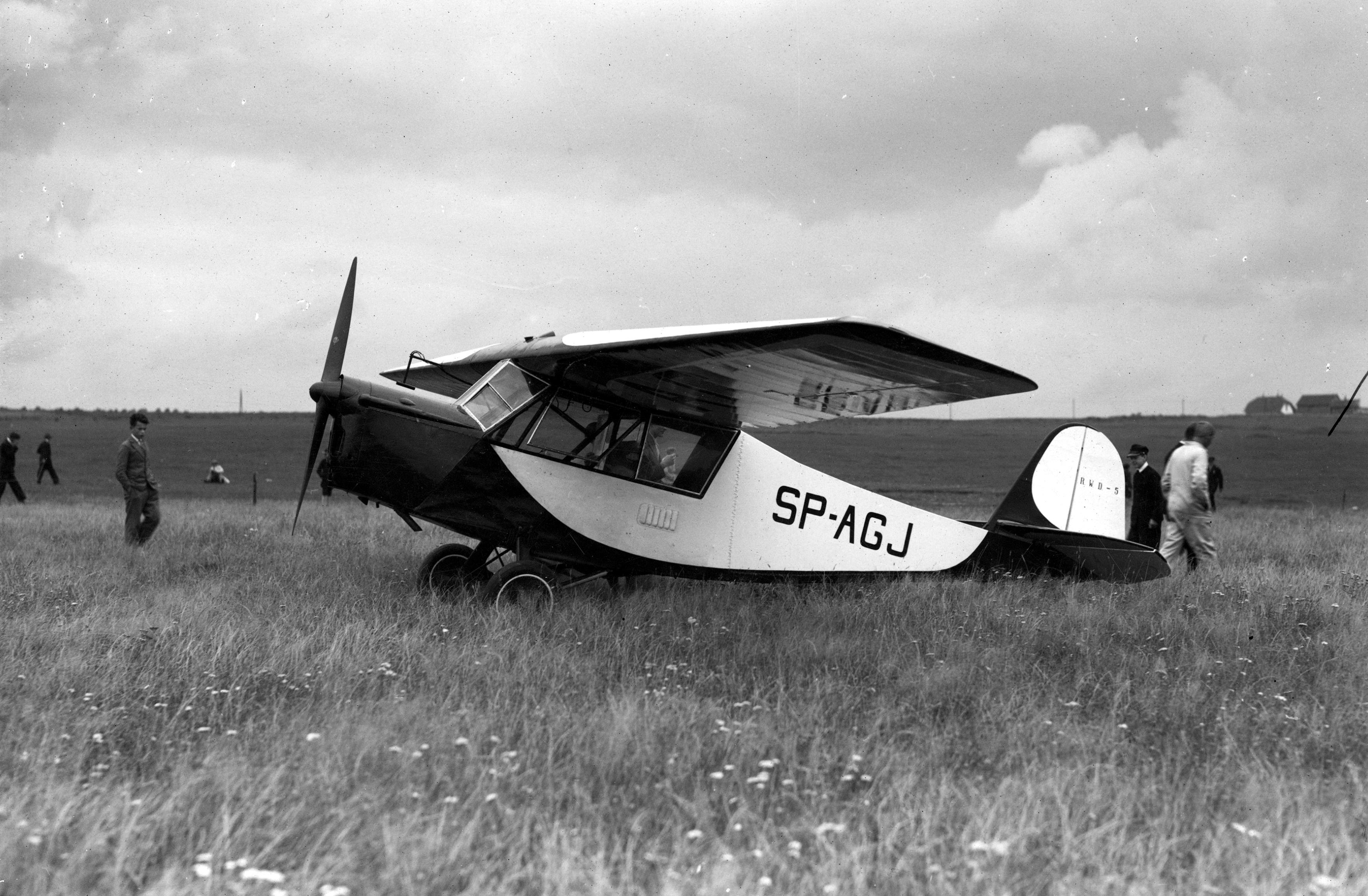 Samolot RWD 5 o oznaczeniu SP-AGJ.